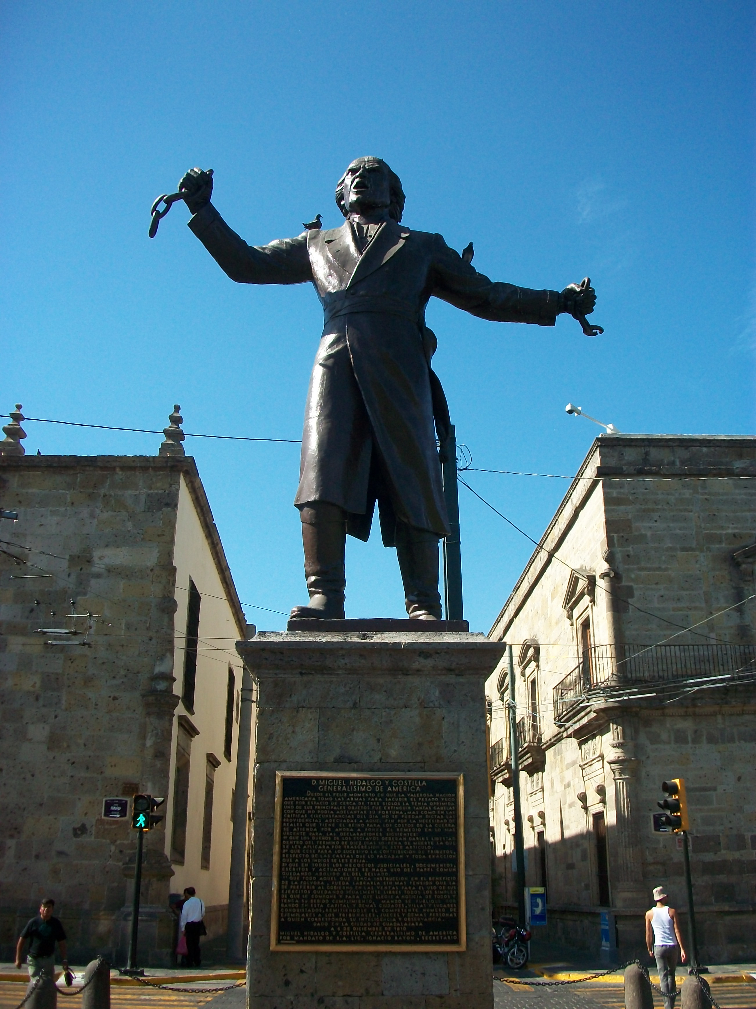 Estatua de Miguel Hidalgo y Costilla rompiendo las cadenas de la esclavitud. Plaza liberación, en Guadalajara, Jalisco.